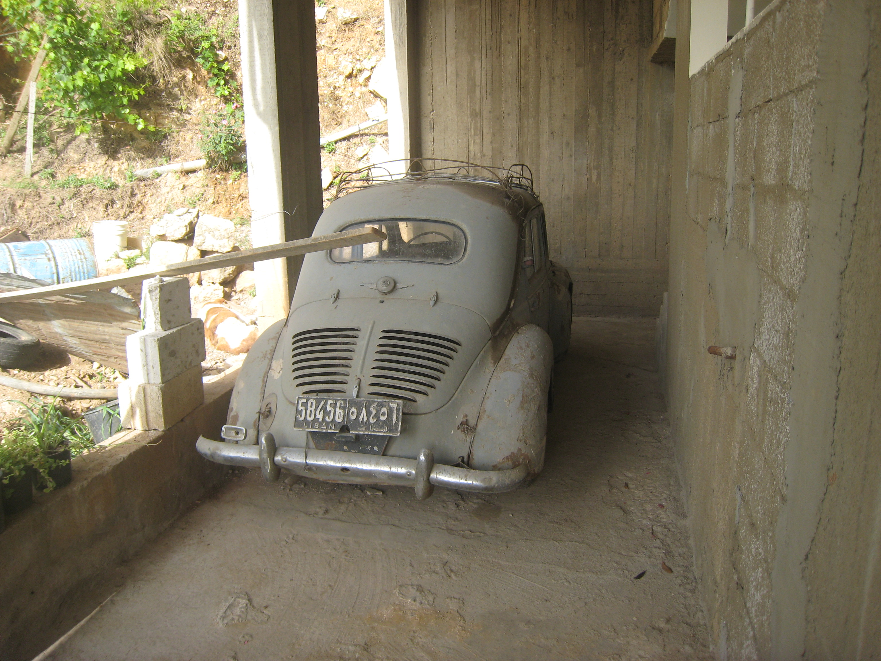 Véhicule libanais (Renault 4CV) avec une ancienne plaque d'immatriculation